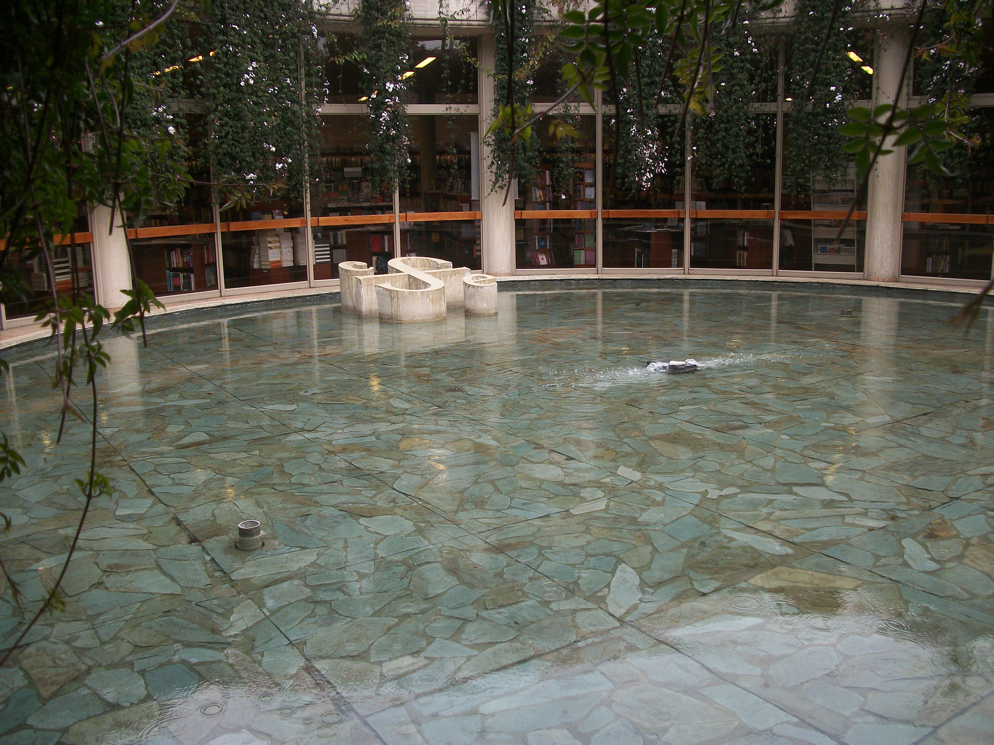 Centro Cultural Gabriel García Márquez, Espejo de agua en la librería de Fondo de Cultura Económica.